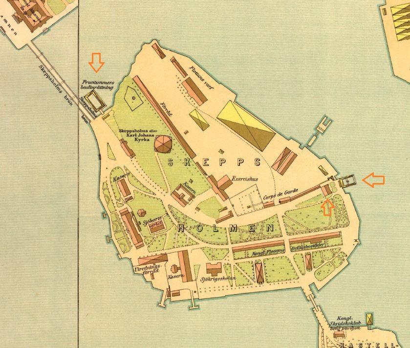 Del av Lundgrens karta från 1885 visande Skeppsholmen. Badhusen markerade med pilar